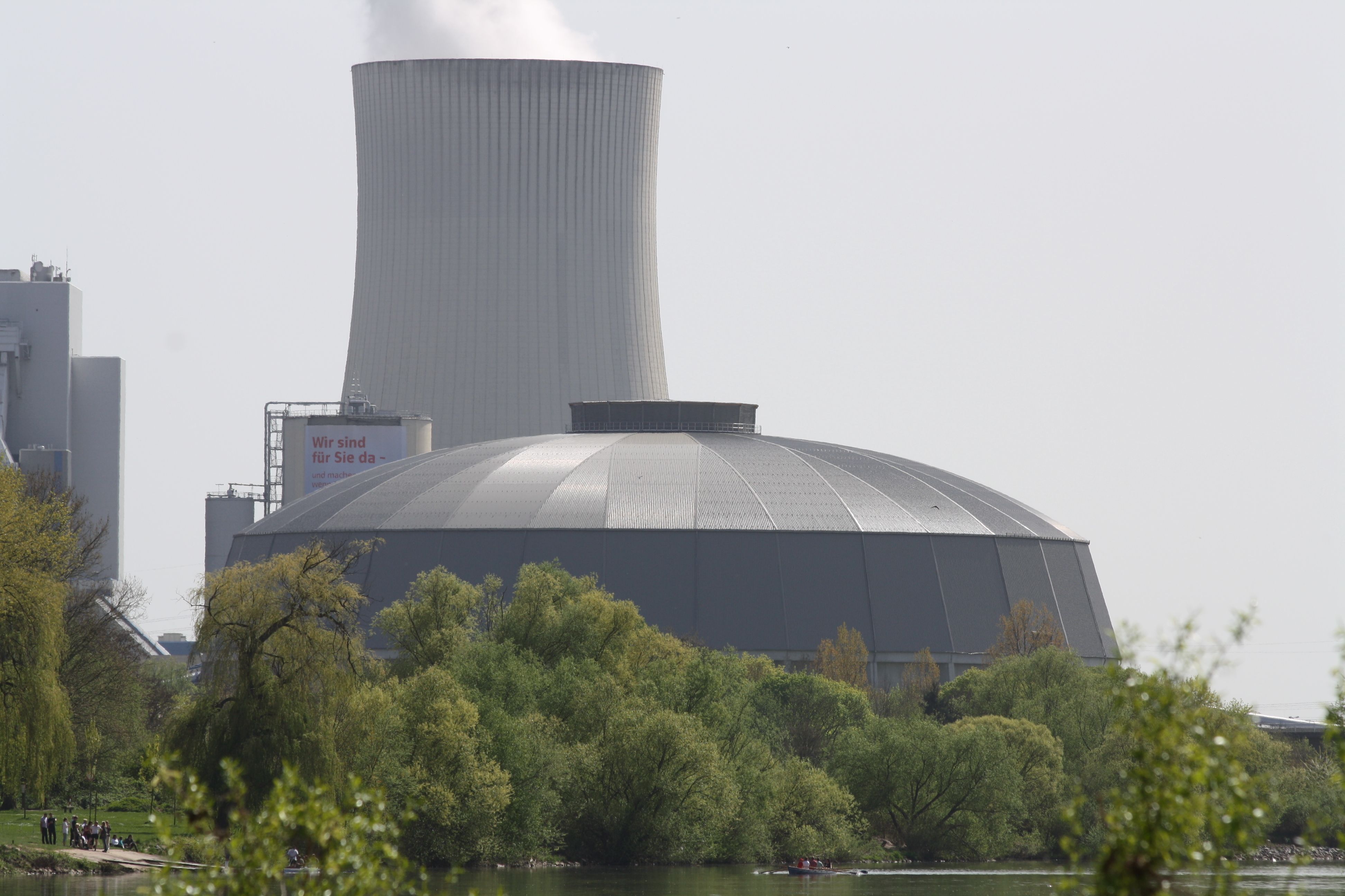 Kraftwerk Staudinger Großkrotzenburg. (Westlicher) Kohlebunker von Norden